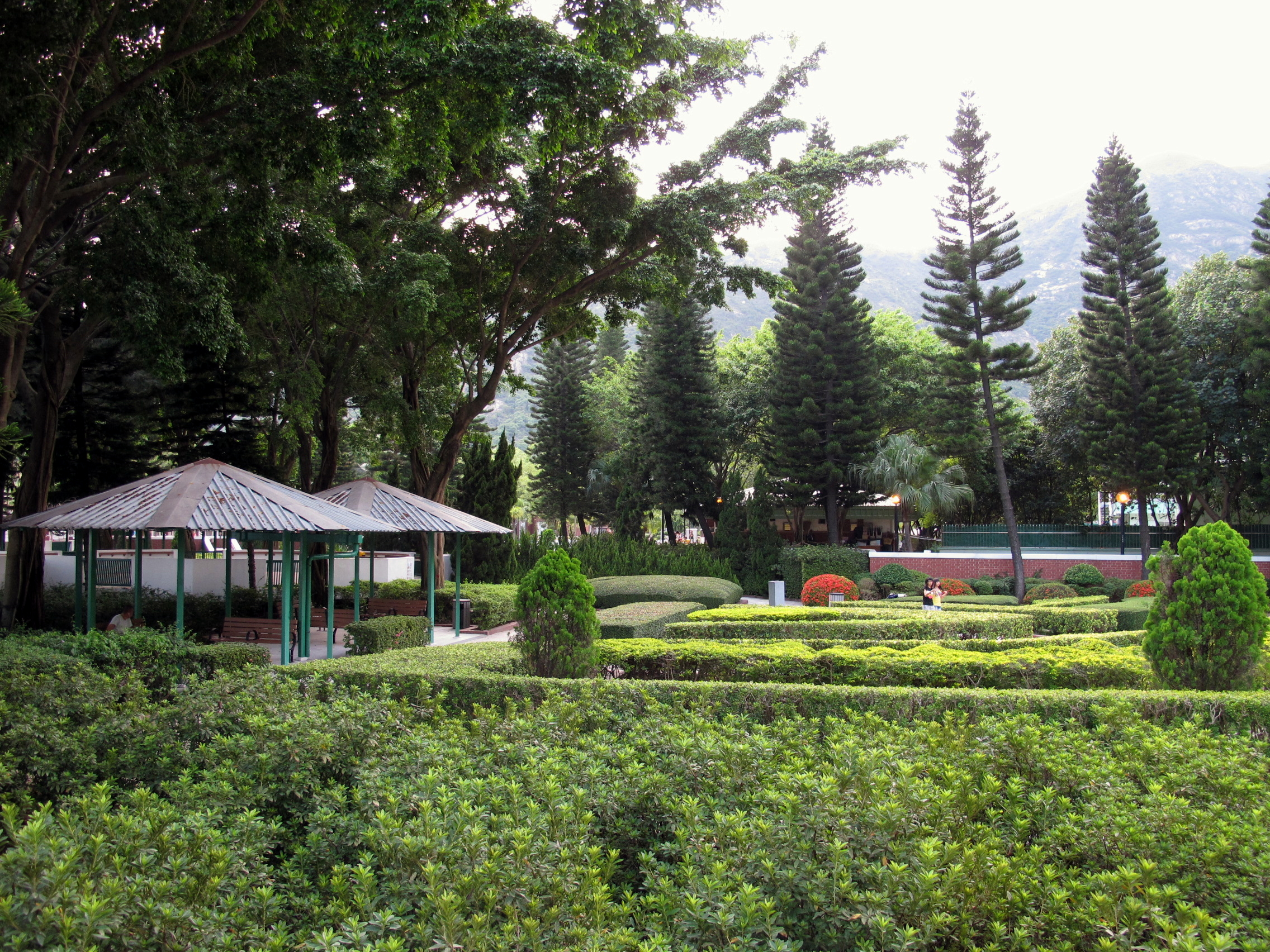 Butterfly Beach Park Maze